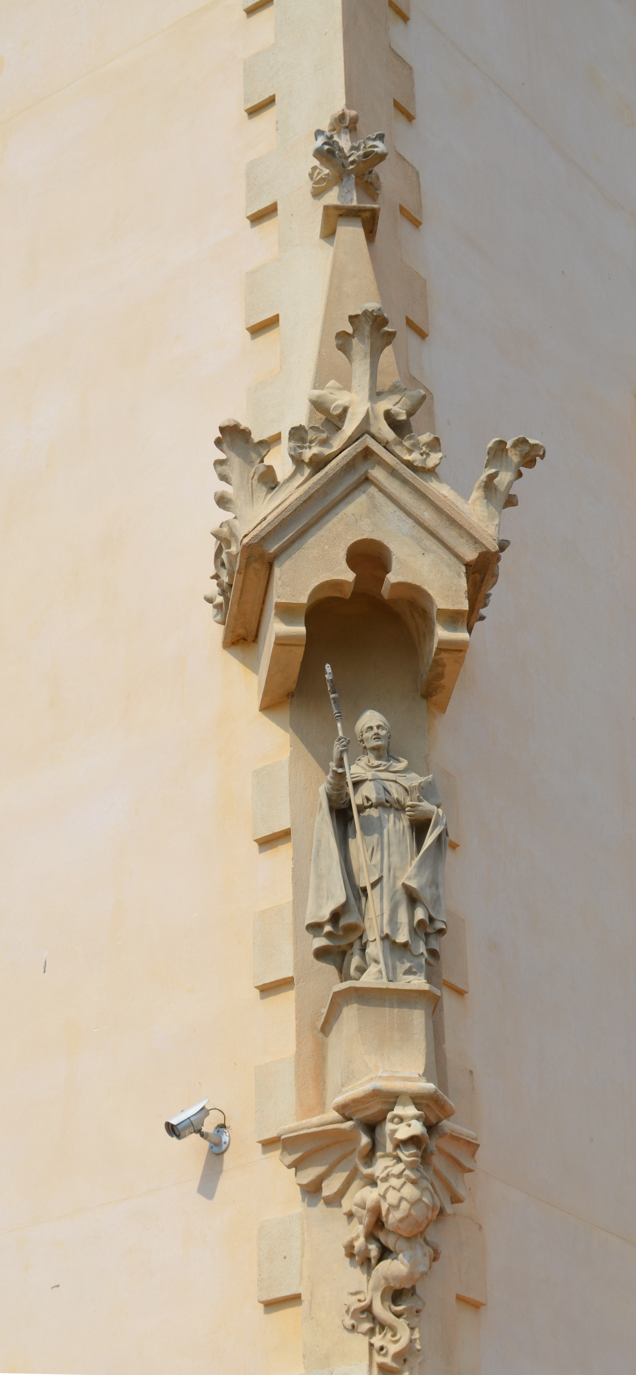 Lloret de Mar, Can Saragossa, Detail